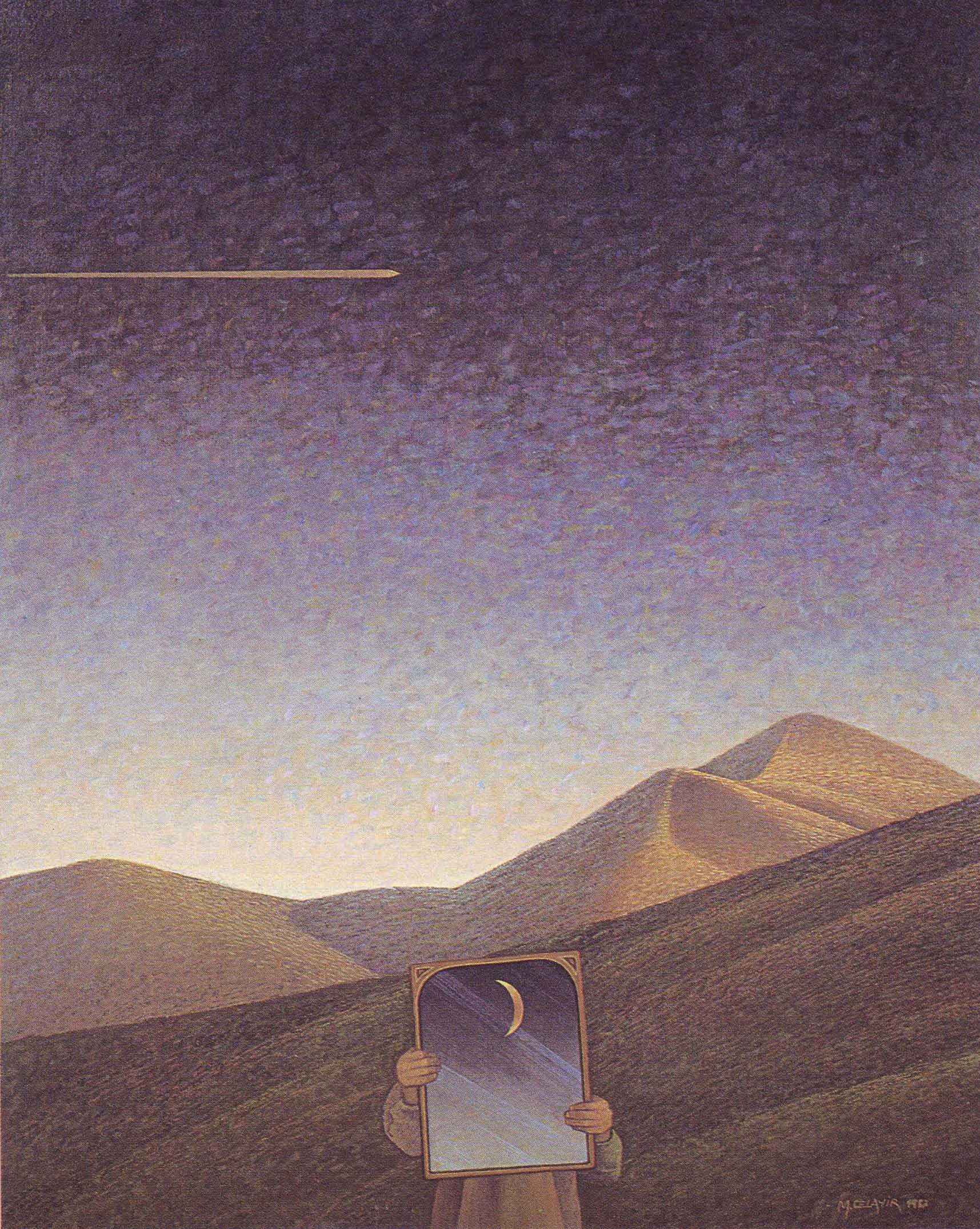 Mahmut Celayir: Der Spiegel, Öl auf Leinwand, 50 x 65 cm, 1988.